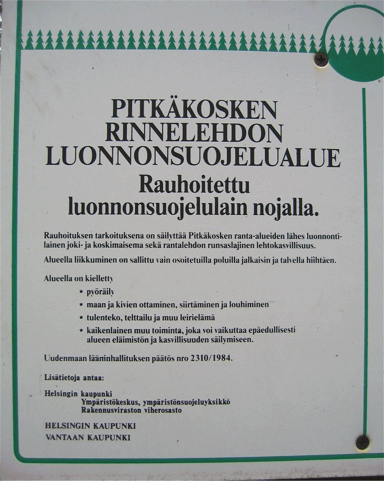 Nature Protection area for the riverbanks of Pitkäkoski in Vantaanjoki river, covering both the sides of the river i.e. Helsinki and Vantaa, in Finland. (In Finnish: Pitkäkosken ranta-alueilla sijaitsevan Pitkäkosken rinnelehtojen rauhoituskyltti, Vantaanjoen Pitkäkoski Helsingin ja Vantaan rajalla)